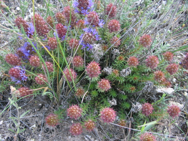 Pablo Alberto Salguero Quiles